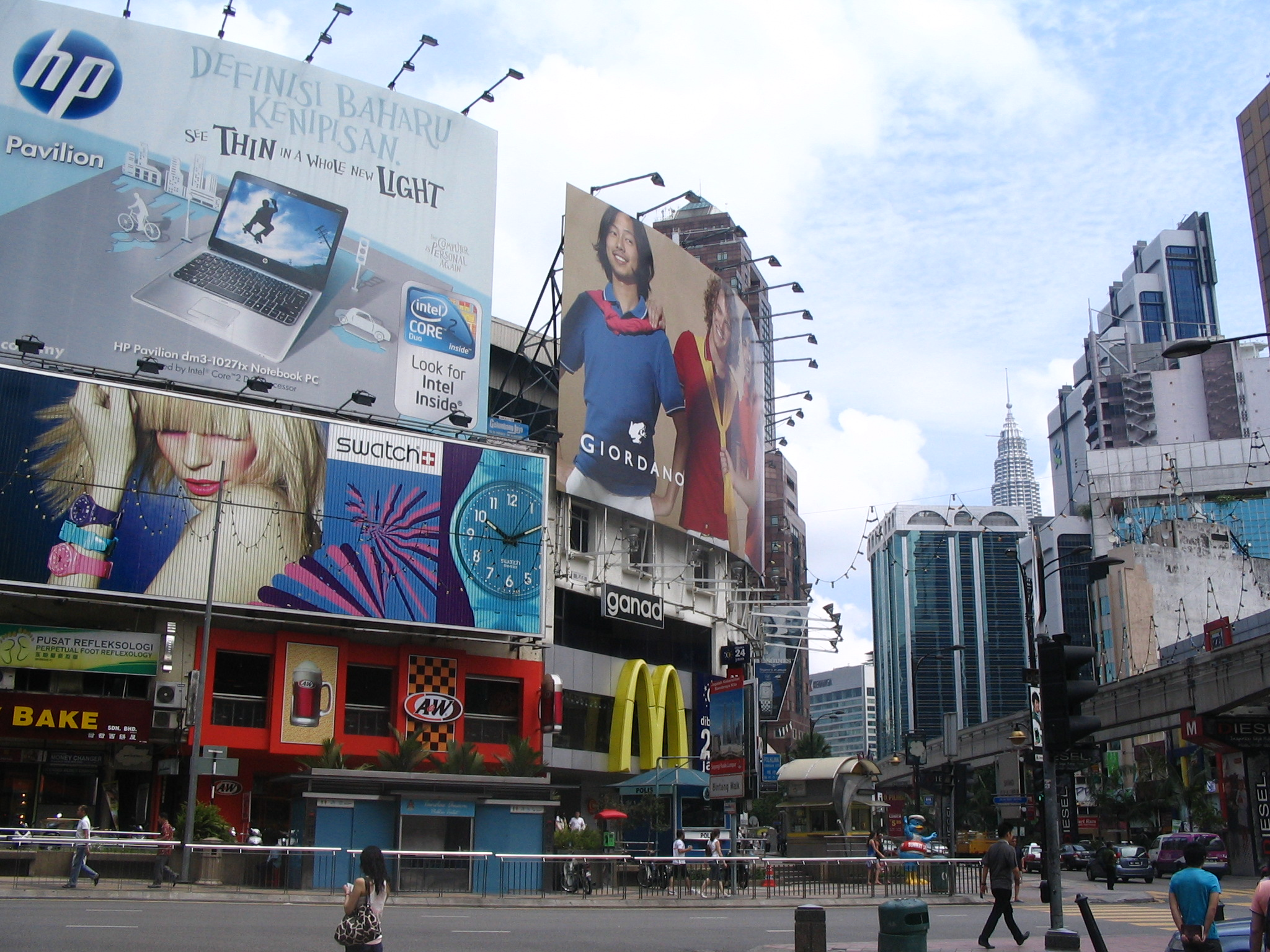 Bukit Bintang - Croisement entre Jalan Sultan Ismail et Jalan Bukit Bintang - Kuala Lumpur - Malaisie